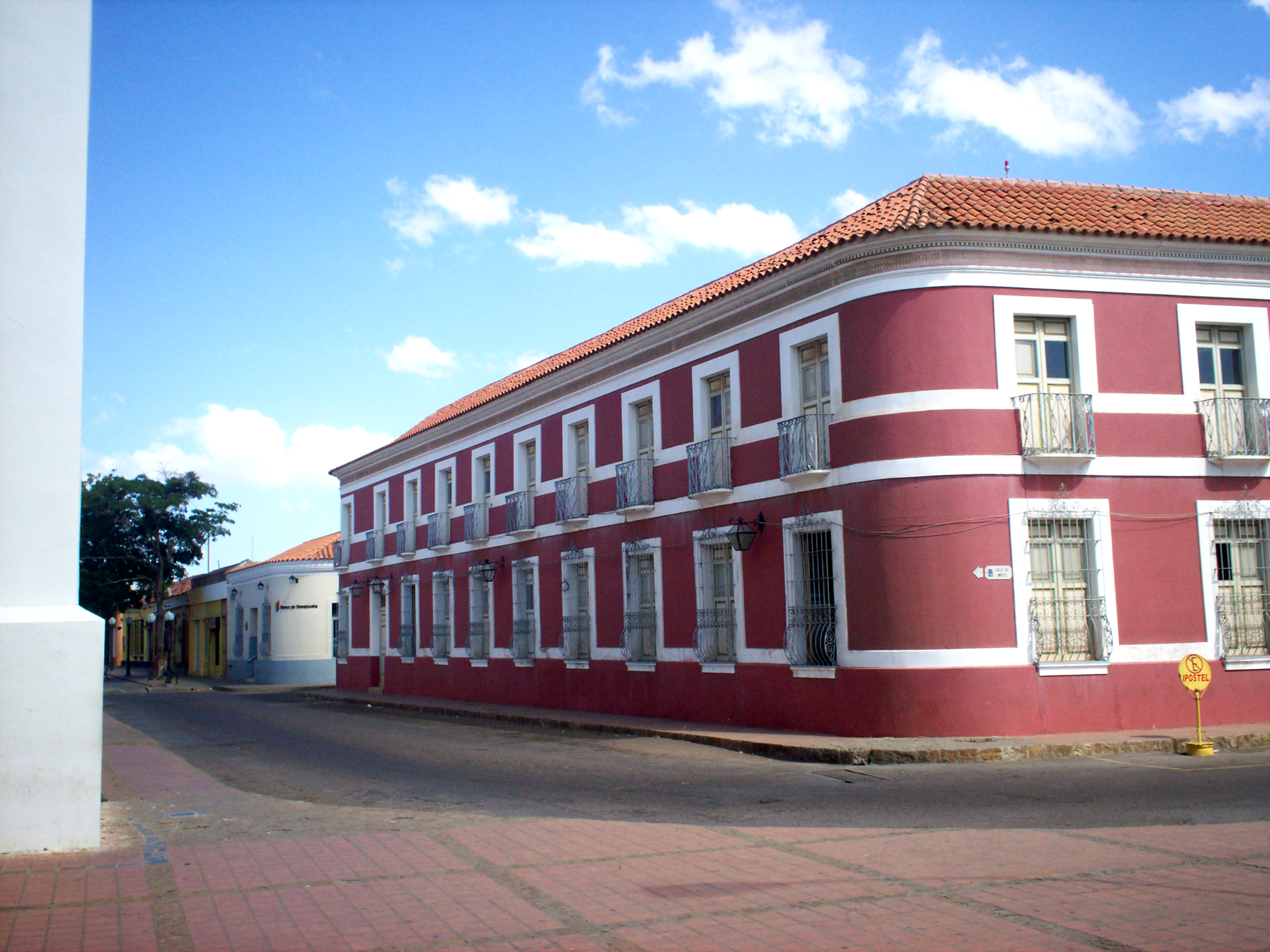 Santa Ana de Coro, Estado Falcón